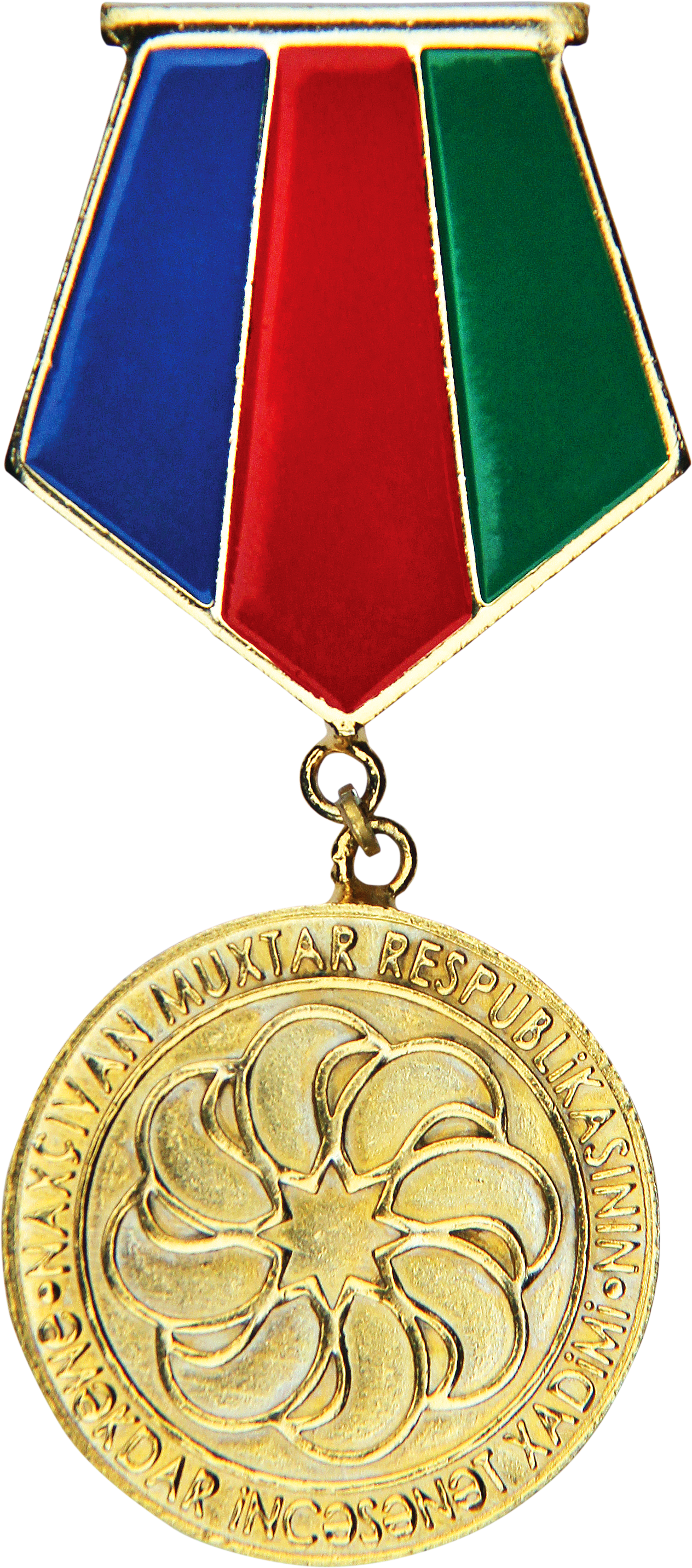 Naxçıvan Muxtar Respublikasının əməkdar incəsənət xadiminin döş nişanı